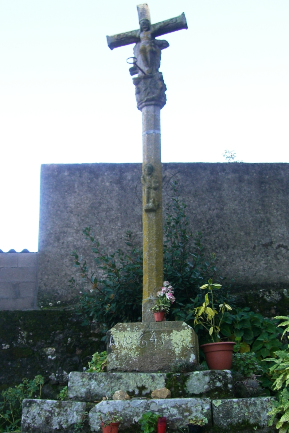 Cruceiro da Costa na parroquia de Castrelos - Vigo